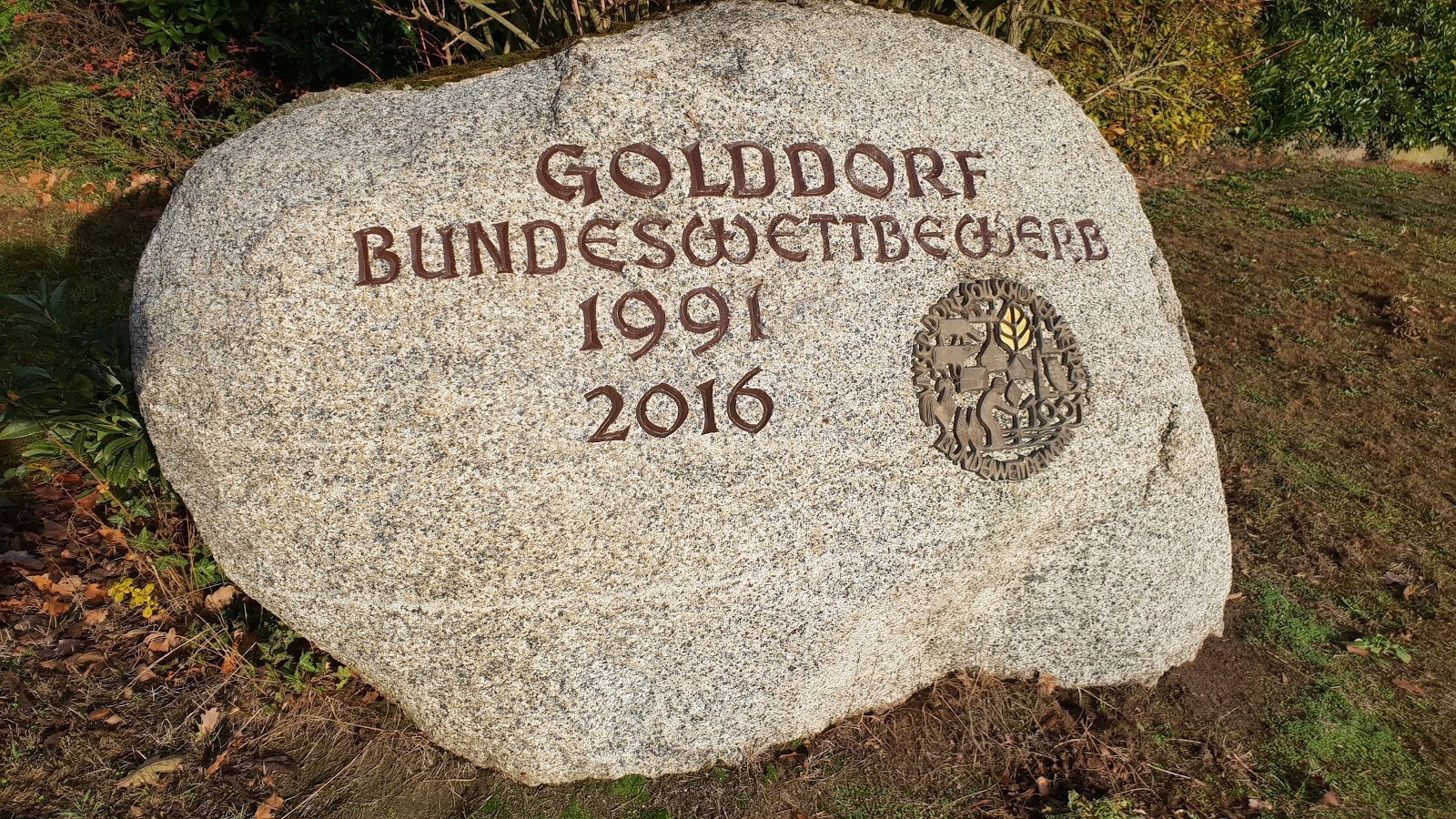 Feldstein ergänzt durch das Jahr 2016